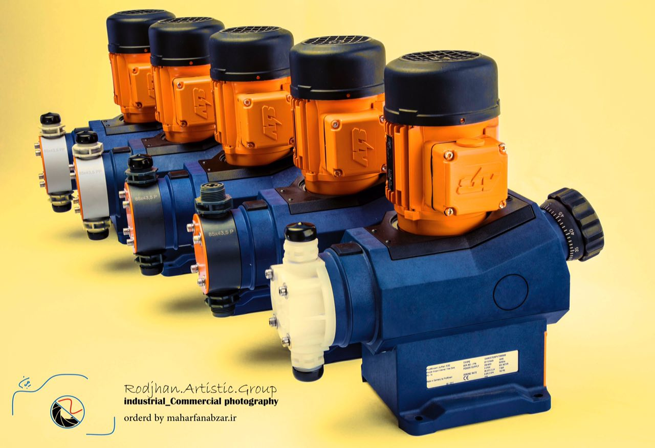 از راست به چپ PVDF PVC PVC PolyPropylene Polypropylene